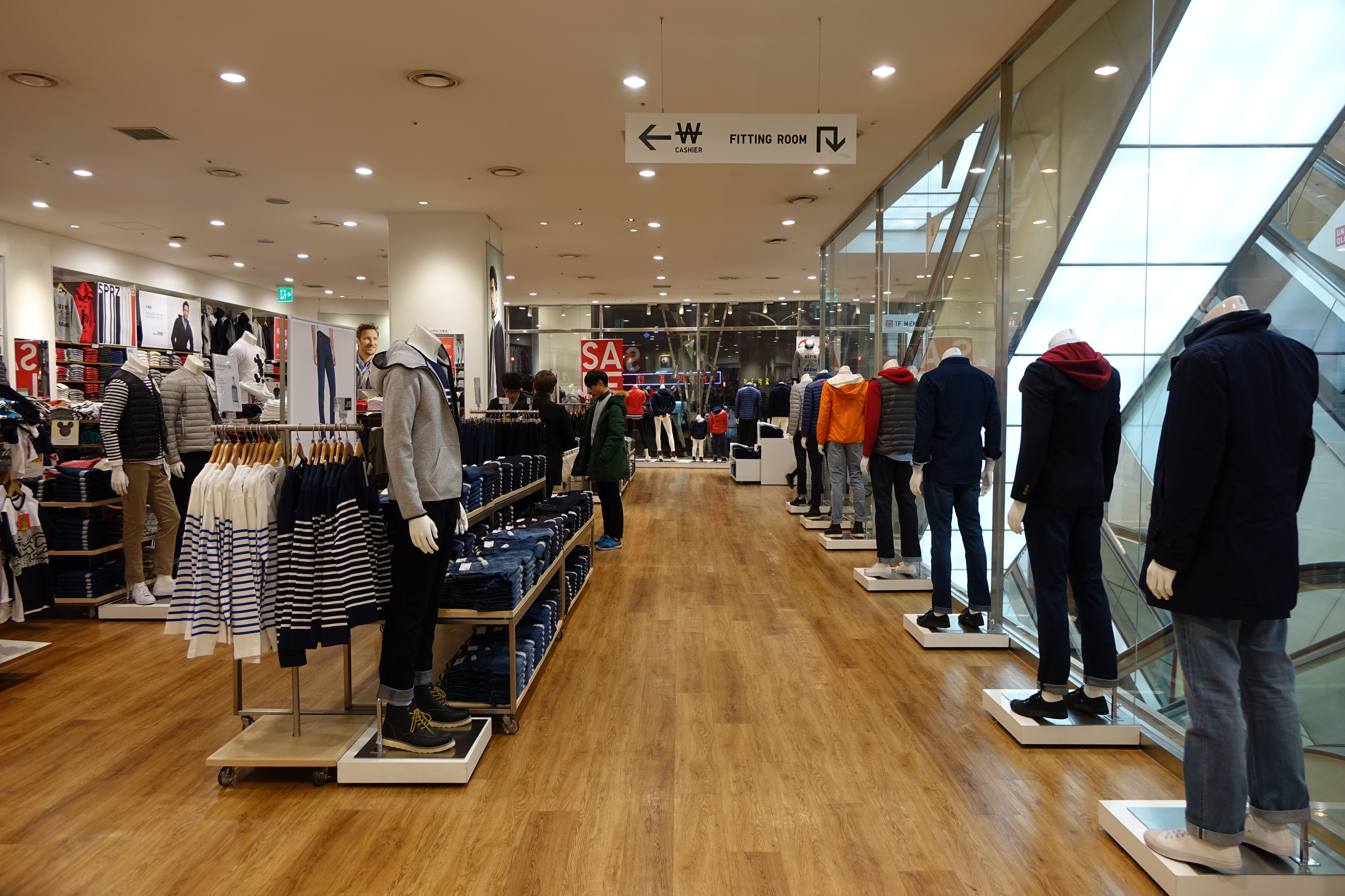 유니클로 안양점